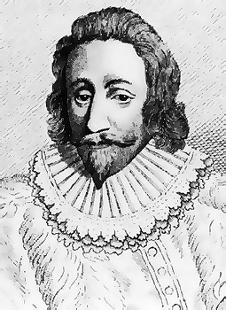 Sir Francis Windebank (1582-1646)